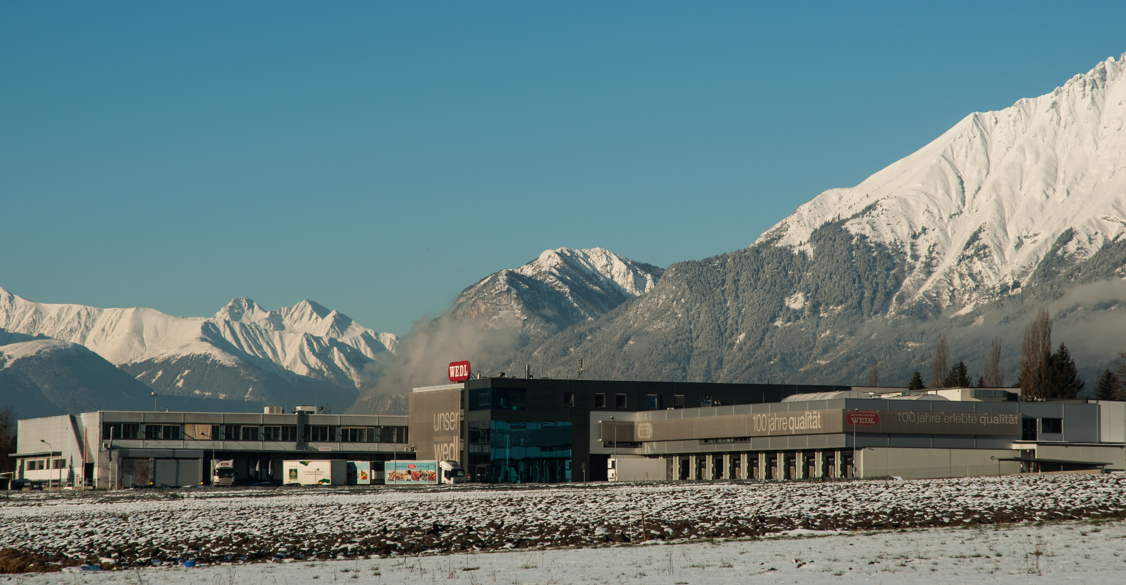 Zentrale des Handelshauses Wedl in Mils bei Hall in Tirol